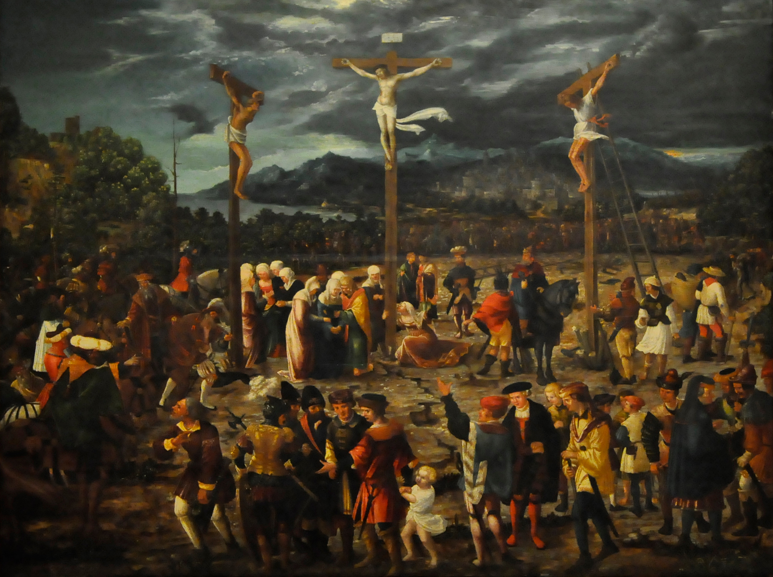 La obra representa a Cristo crucificado entre los dos ladrones en el monte Gólgota.